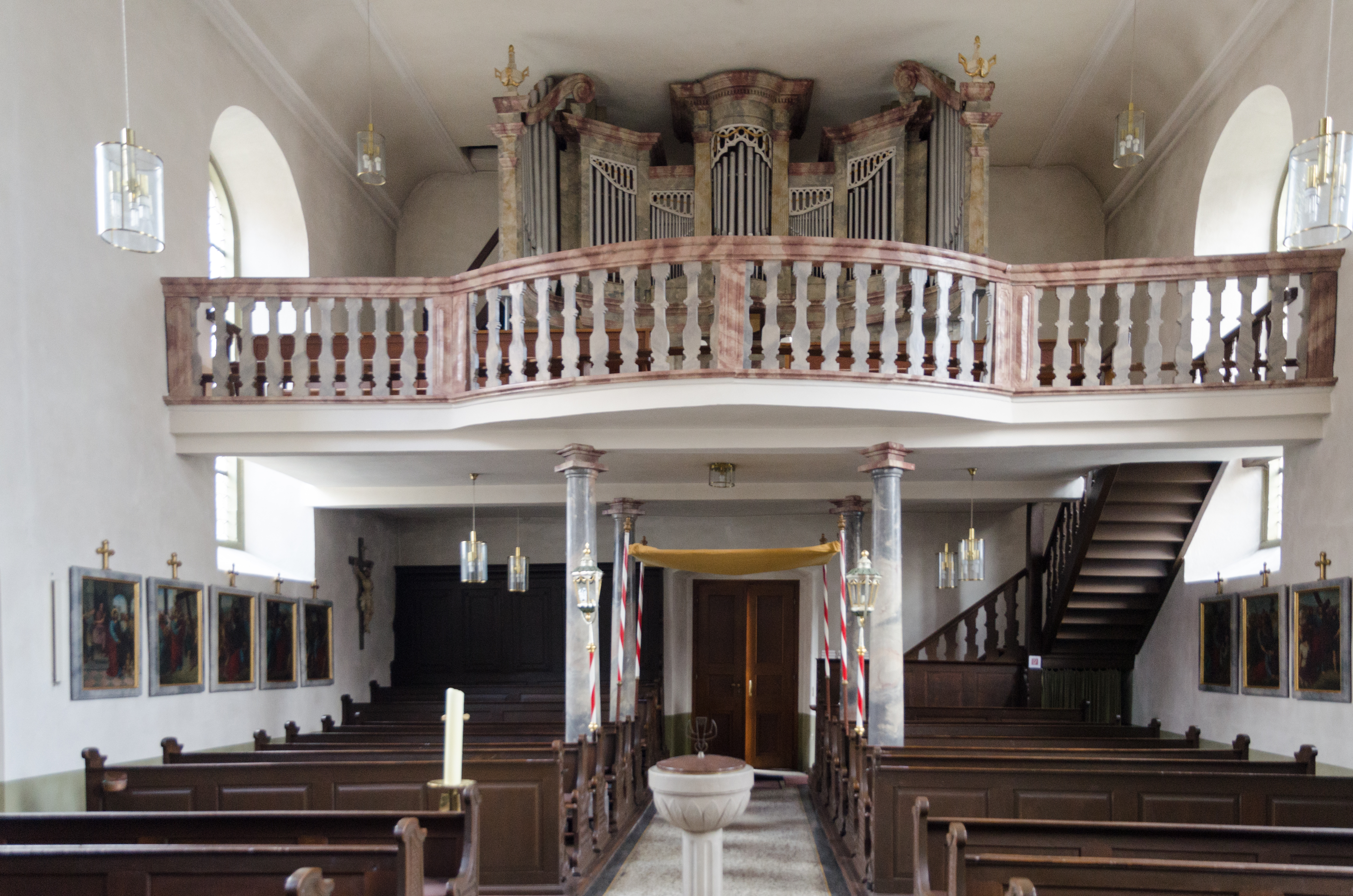 Wasserlosen, Brebersdorf St. Petrus in Ketten